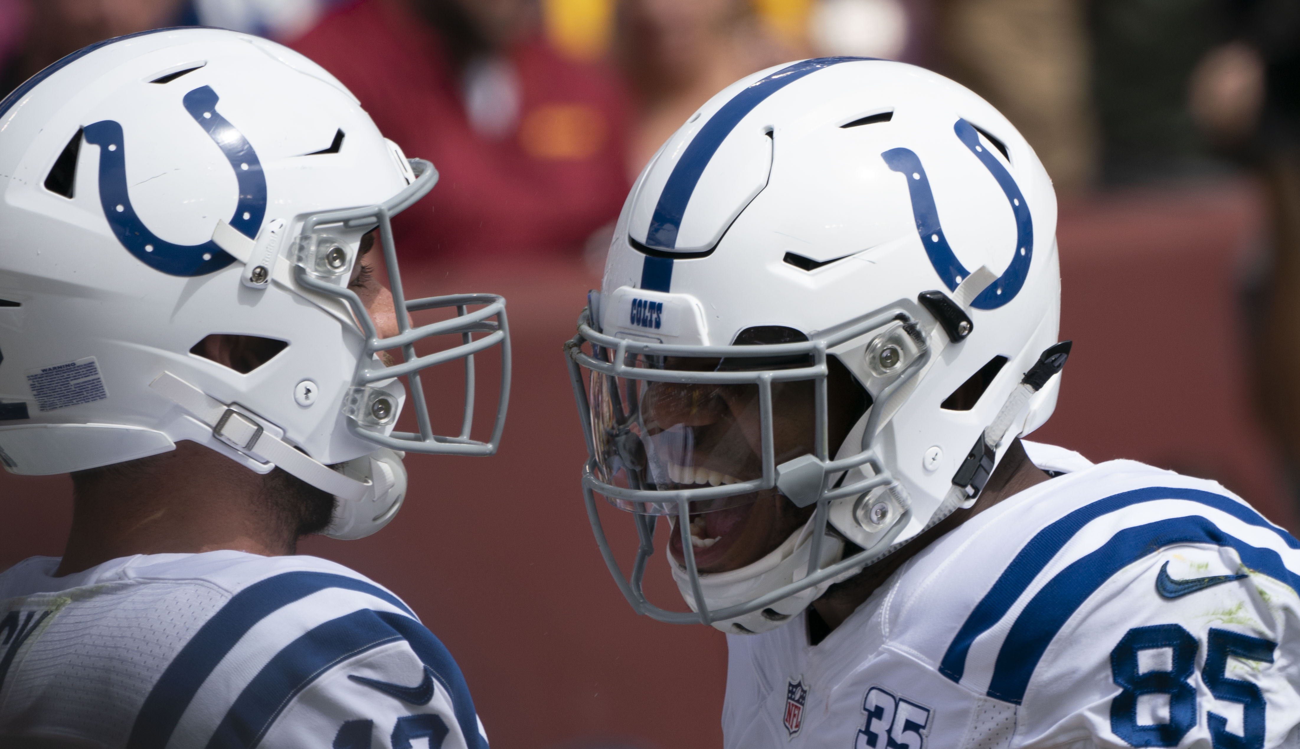 Colts at Redskins 09/16/18